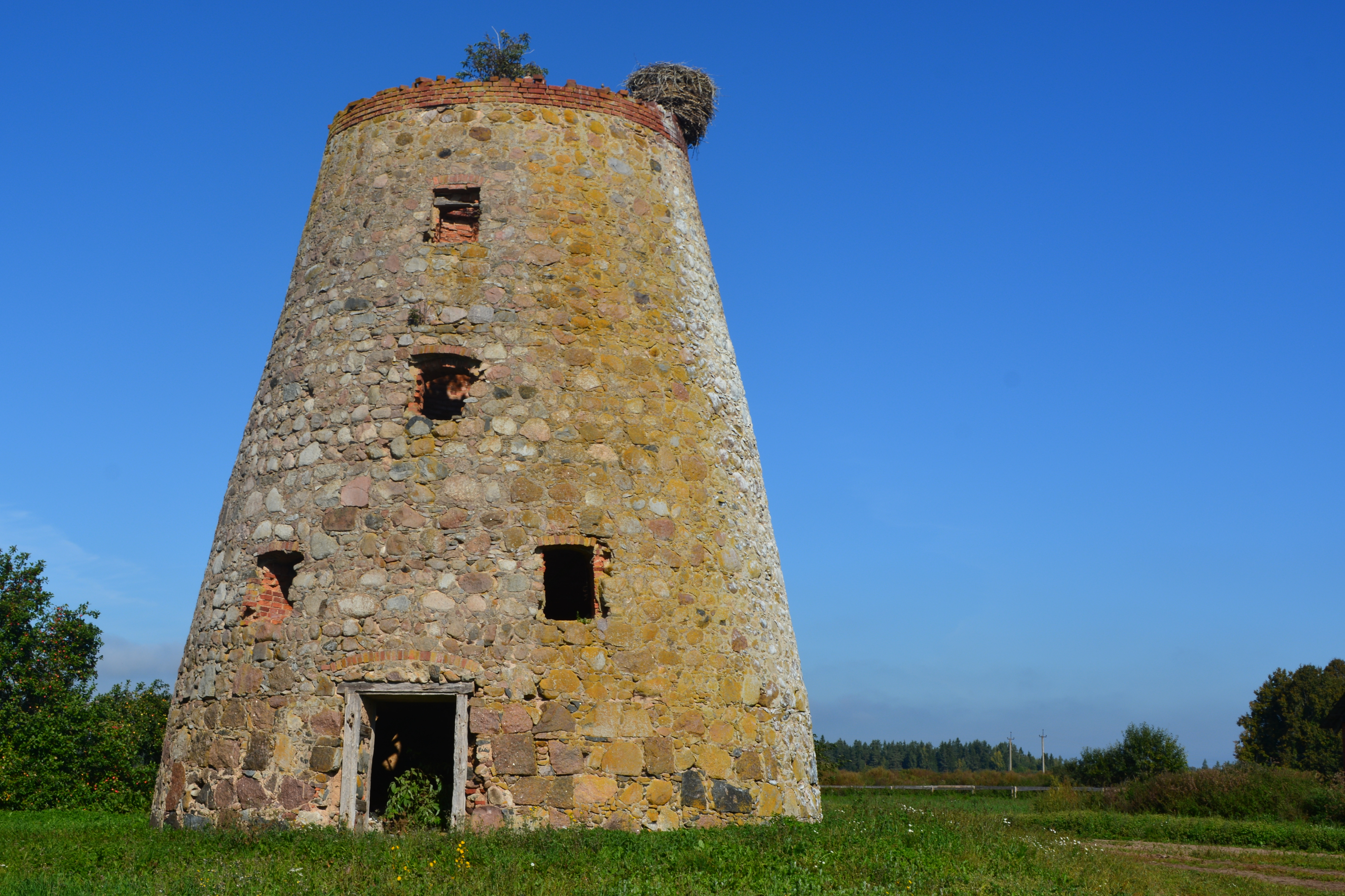 Rasina mõisa tuuleveski